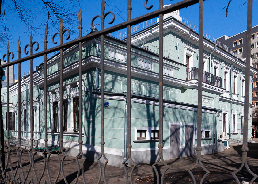 Городская усадьба Е. Н. Вандышниковой — Э. М. Банза — архитектурный ансамбль в Москве по адресу ул. Воронцово поле, д. 3. Нынешний облик усадьбы сложился в конце XIX века в результате многочисленных перестроек главного особняка и флигелей под руководством архитекторов С. Ф. Воскресенского и С. А. Коссова.